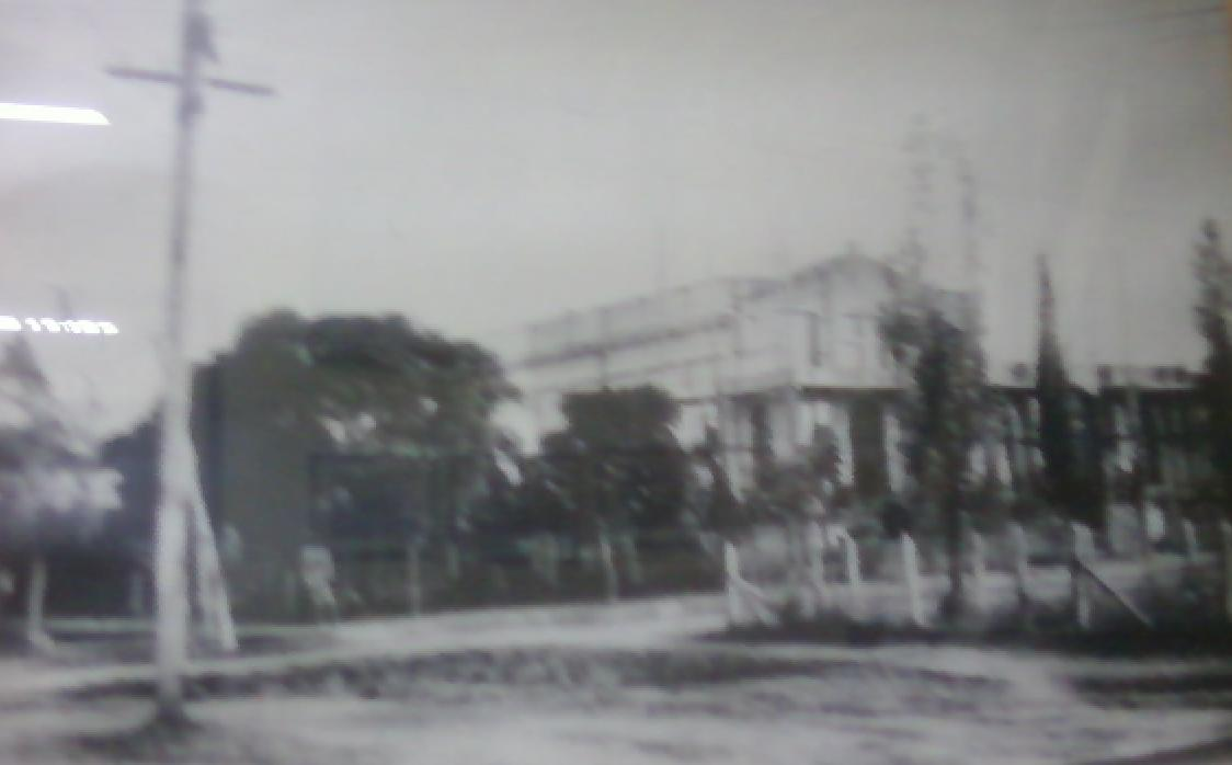 Fotografía de la Catedral de Formosa tomada en el año del Cincuentenario de su fundación (1.929). Donación de los hermanos Fachini